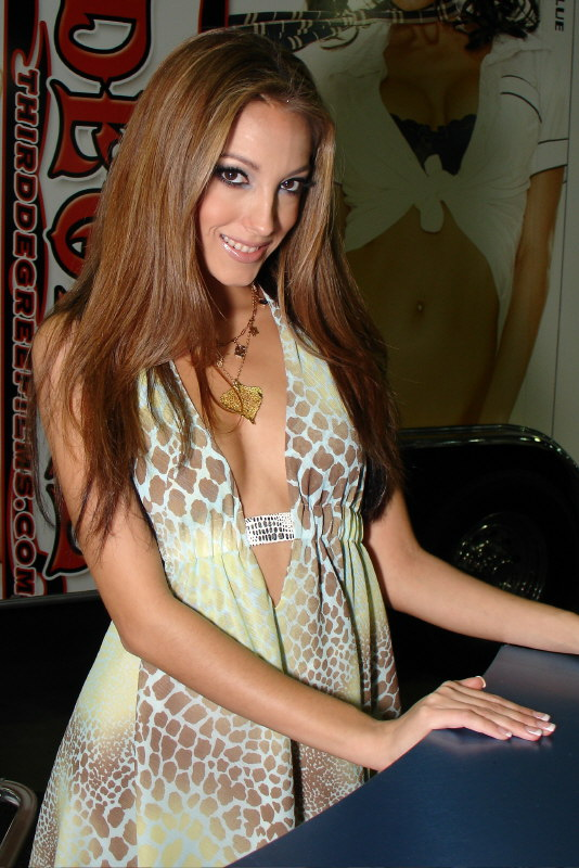 Jenna Haze